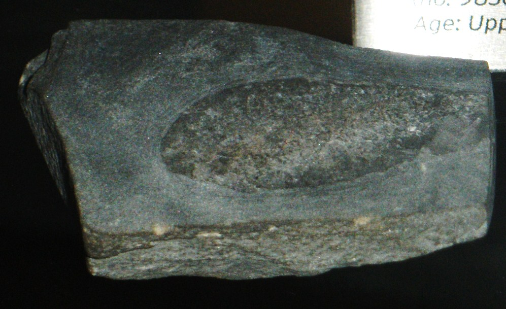 Fossil of Lasanius, an extinct fish- Took the photo at Museon museum, Den Haag